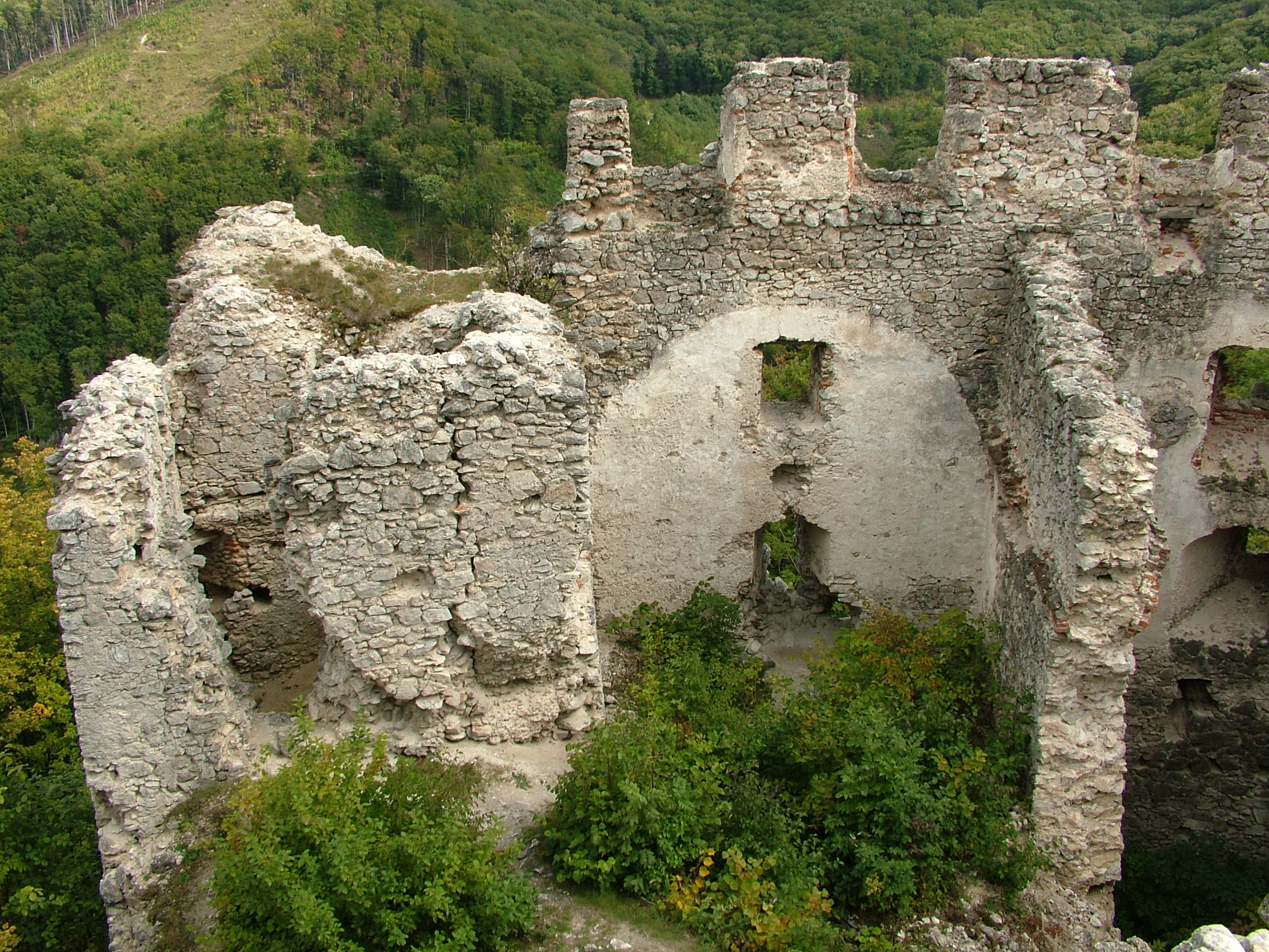 Hrad Tematín